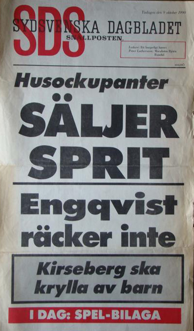 SDS Löpsedel 1990-10-09.